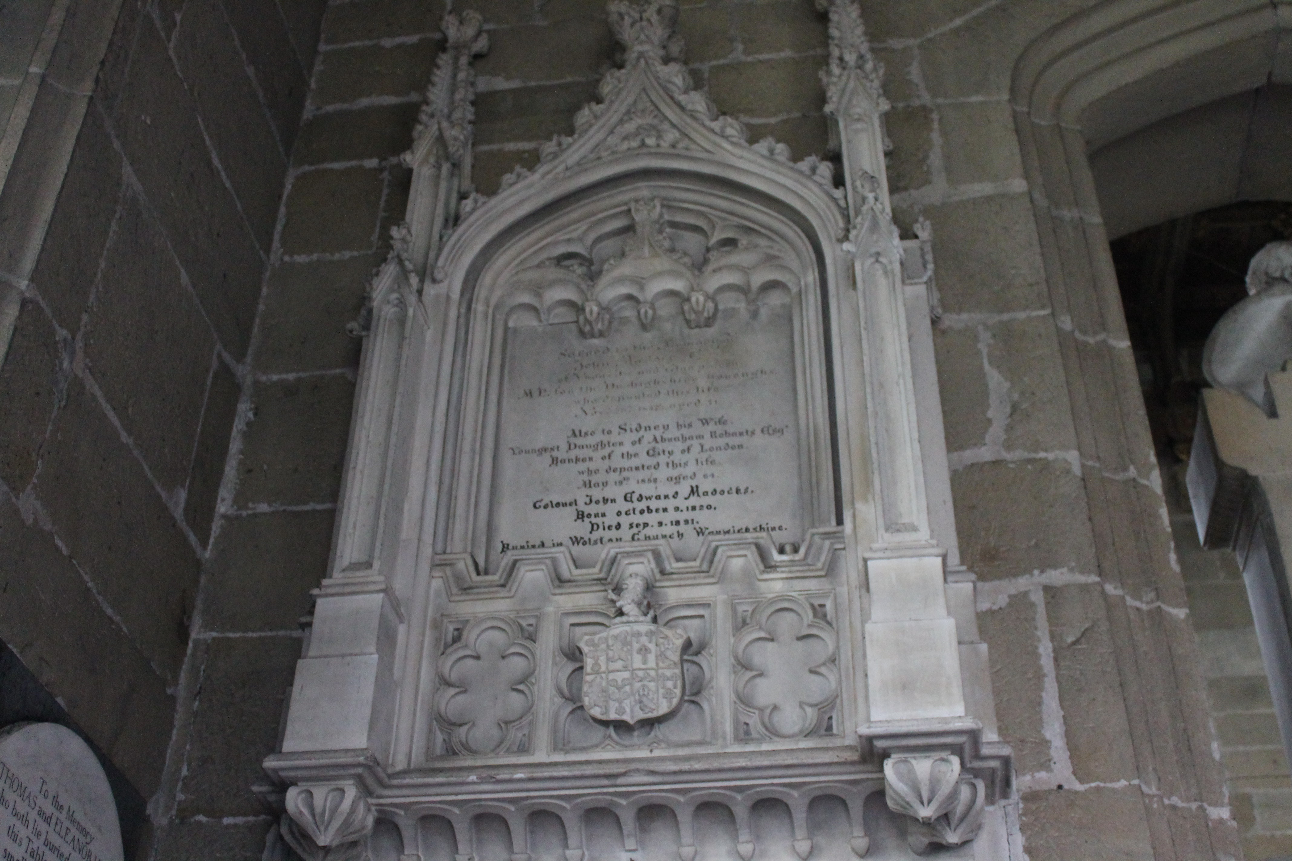 Eglwys yr Holl Seintiau, Gresffordd.